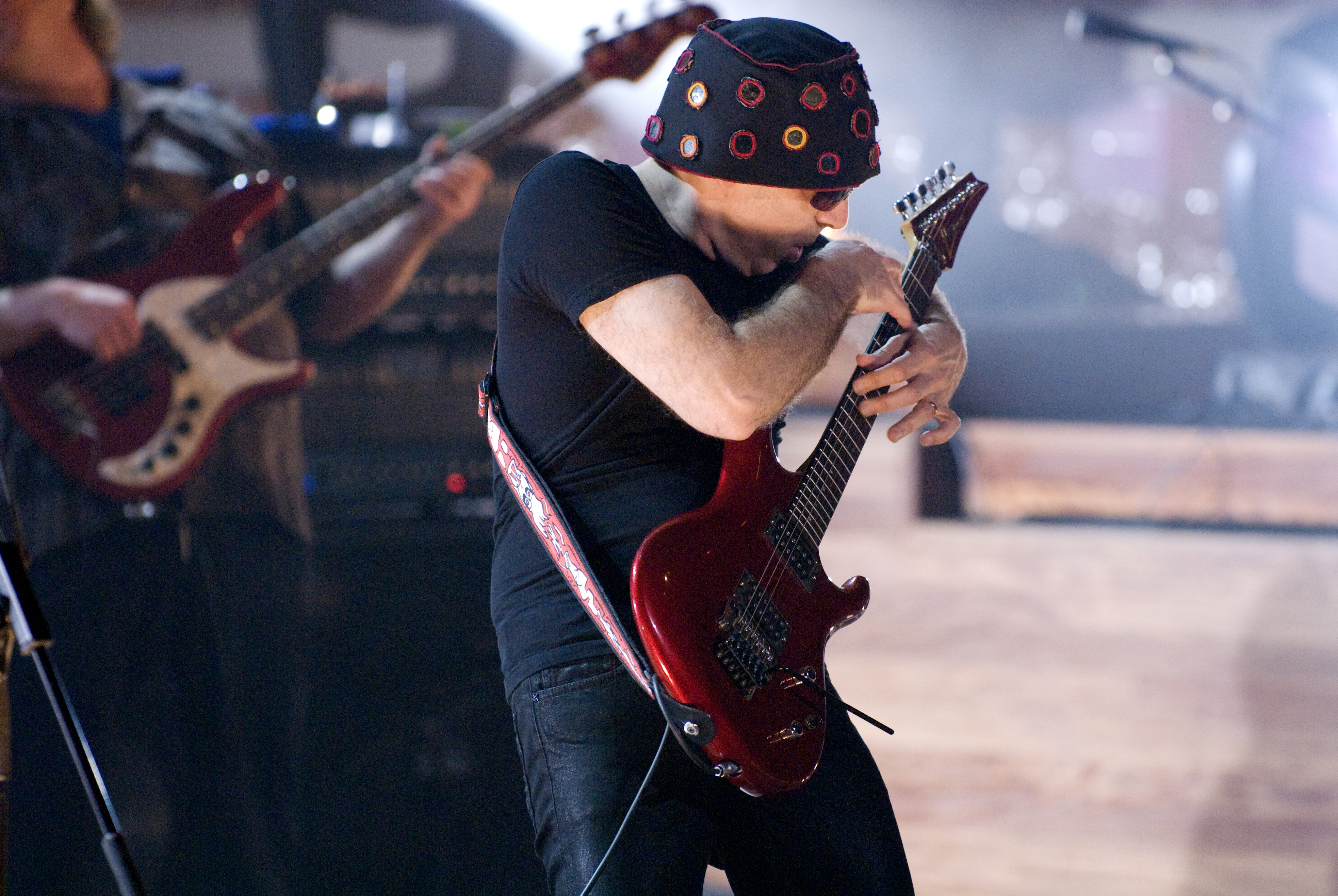 Joe Satriani